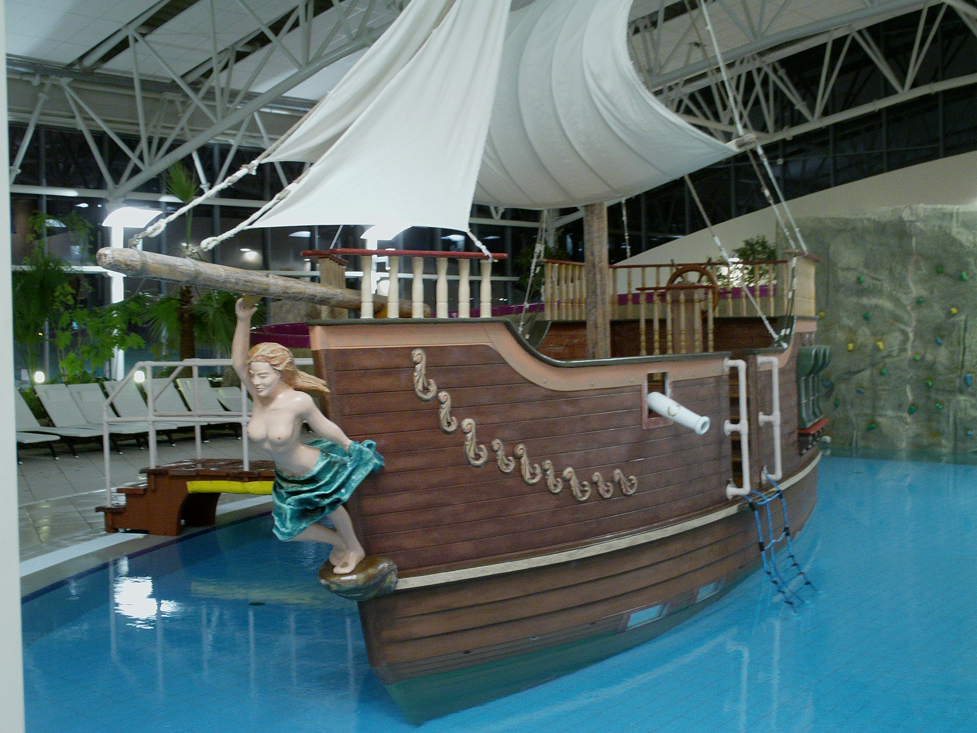 statek piratów w części rekreacyjnej, Poznań.